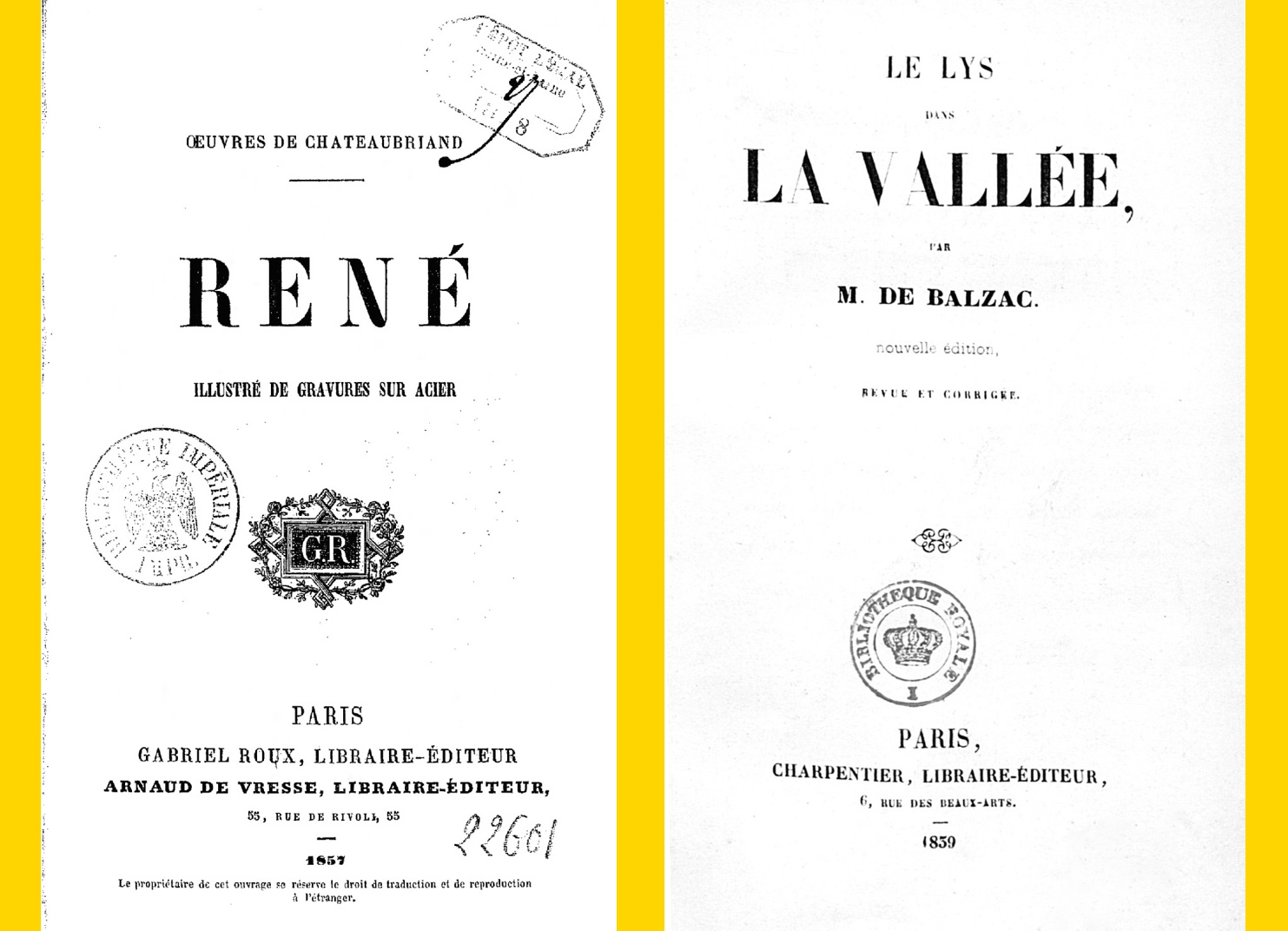 Couvertures de "René", de Chateaubriand ; et de "Le Lys dans la vallée", de Balzac. Fichier "René" : Ficher "Le Lys dans la vallée"